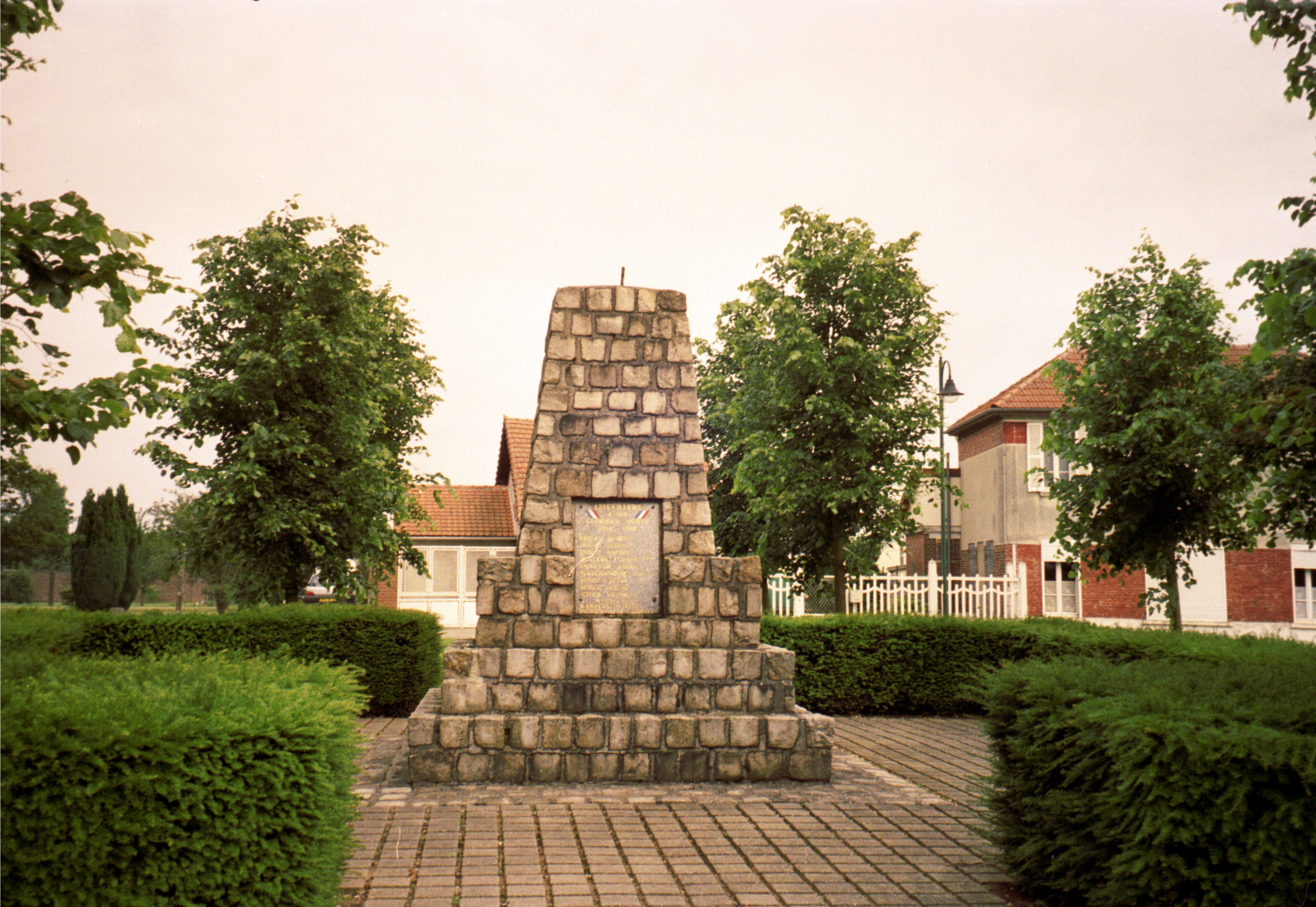 The War memorial in Asseviller, Somme departement, Picardie Region, France